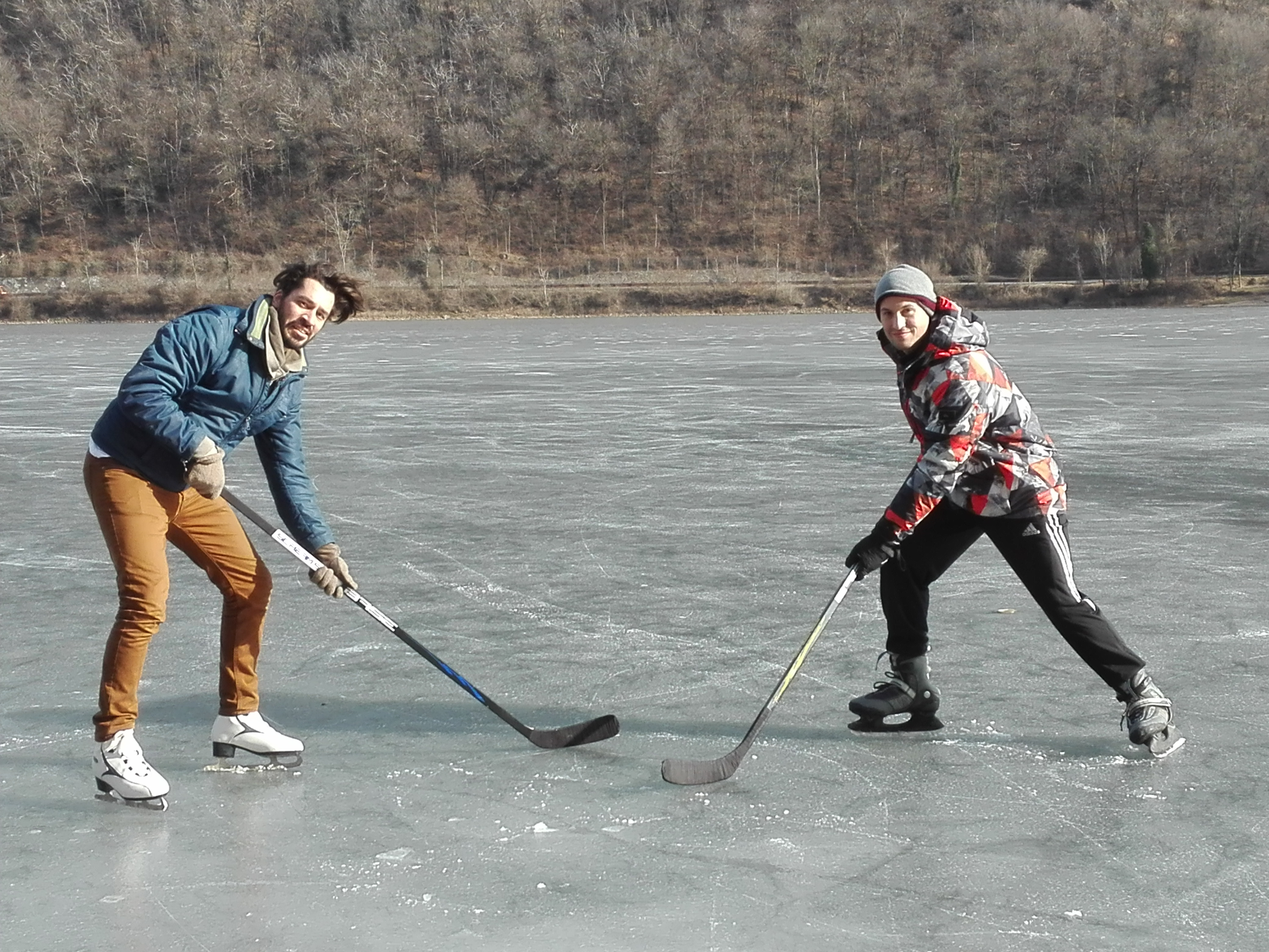 Due pattinatori sulla superficie ghiacciata del Lago di Ghirla, Gennaio 2019